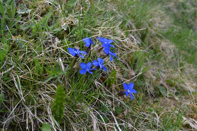 Thierry Leroy